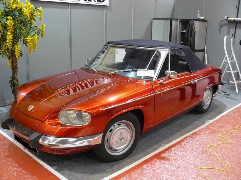 Retromobile 2012